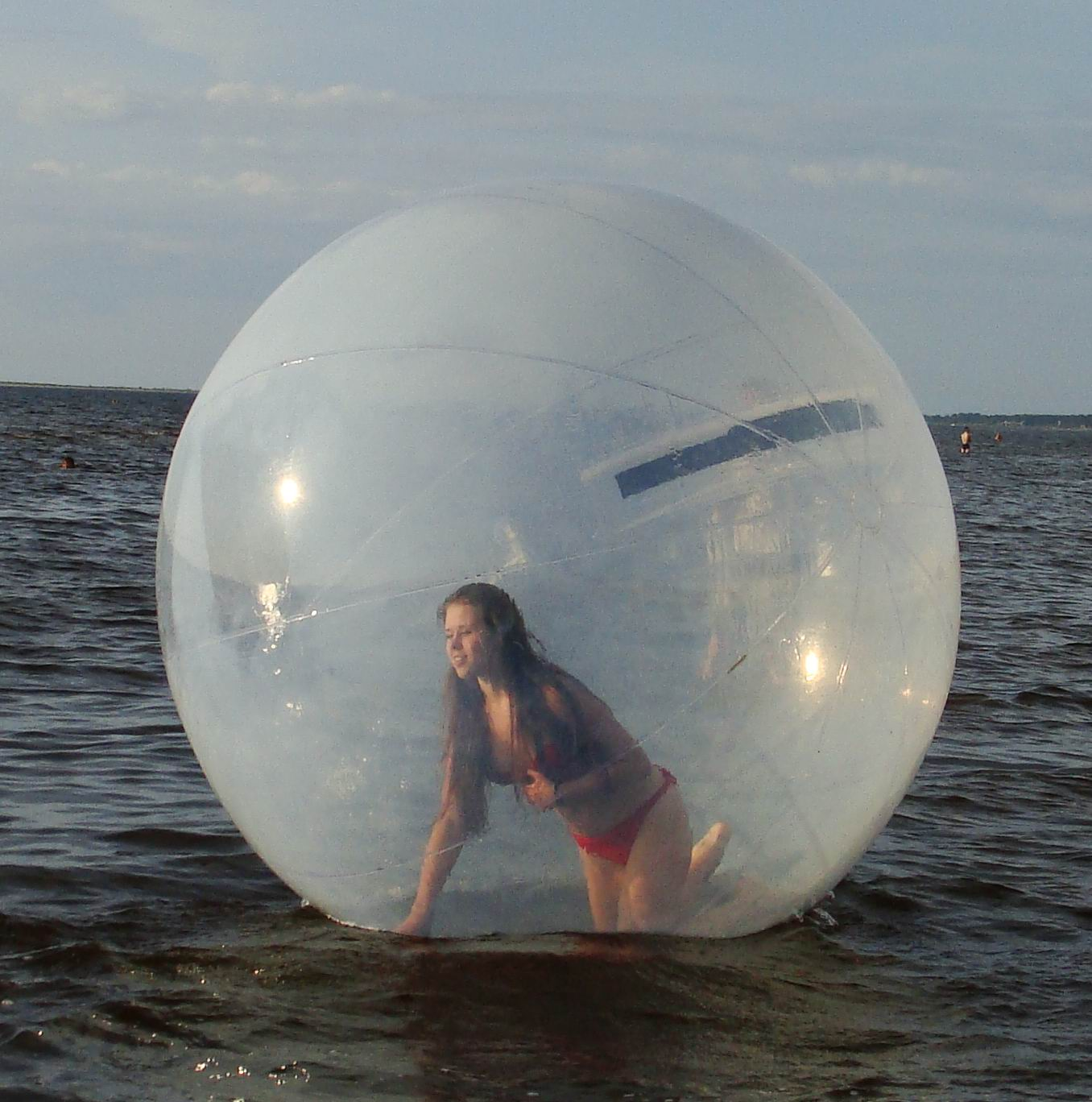 Аттракцион на пляже